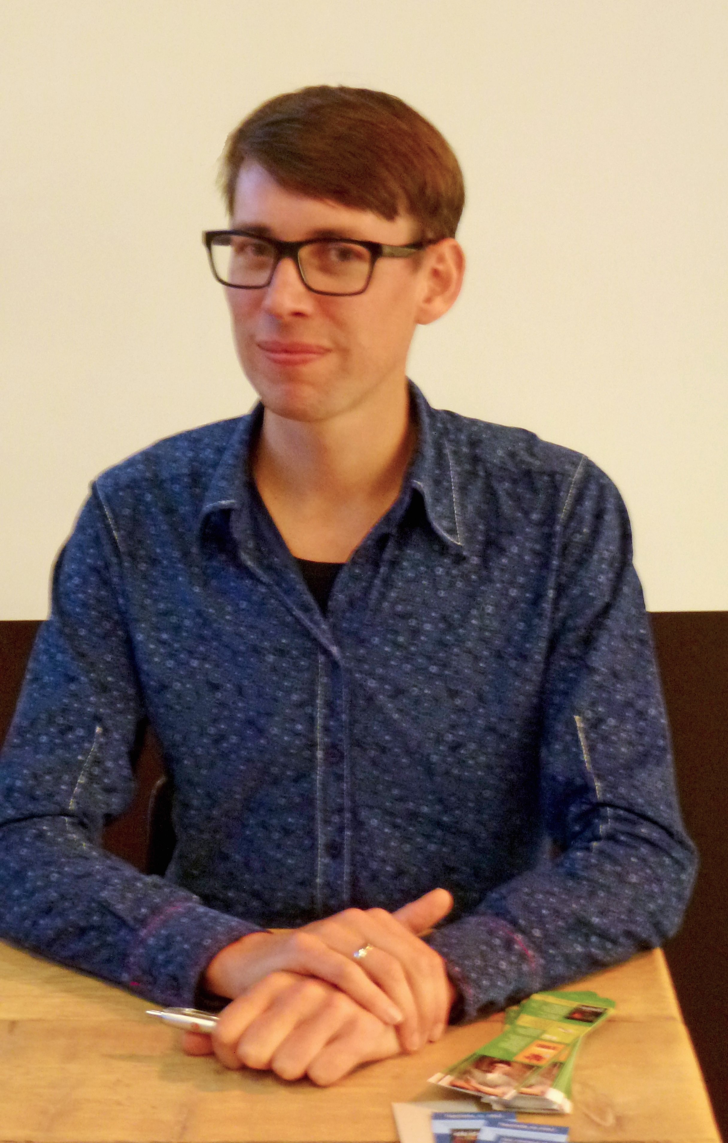 Simon van der Geest (Gouda, 1978) is kinderboekenschrijver, dichter en theaterdocent. De foto is genomen tijdens de kinderboekenmaand in Bibliotheek Gouda (oktober 2015).